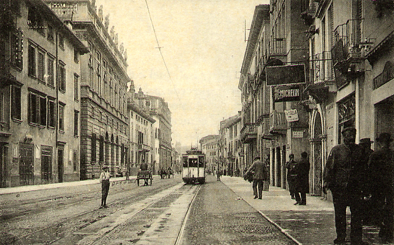 Corso Cavour a Verona in una fotografia del 1900 circa